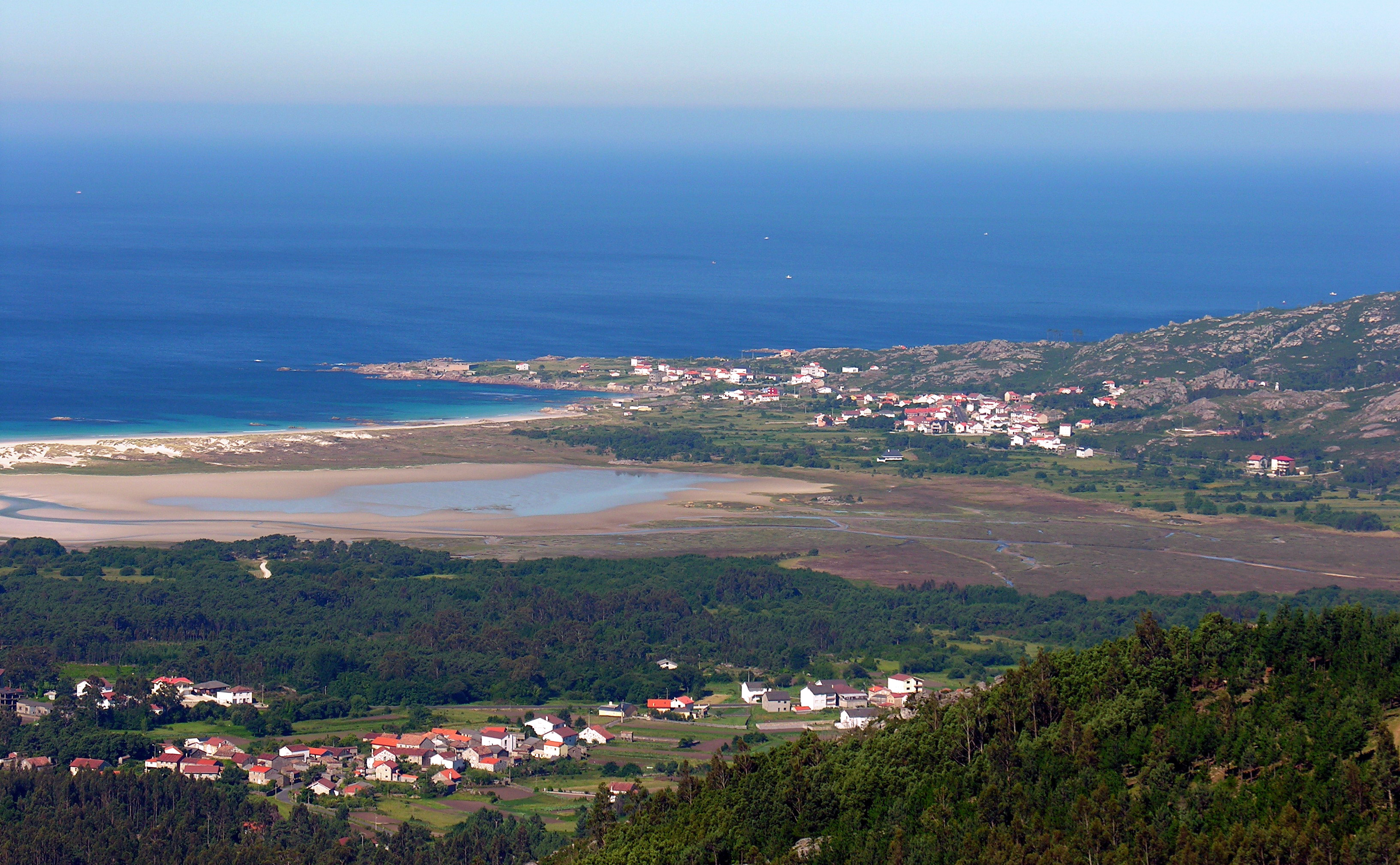 Foto tirada cunha Nikon E8800. Self made